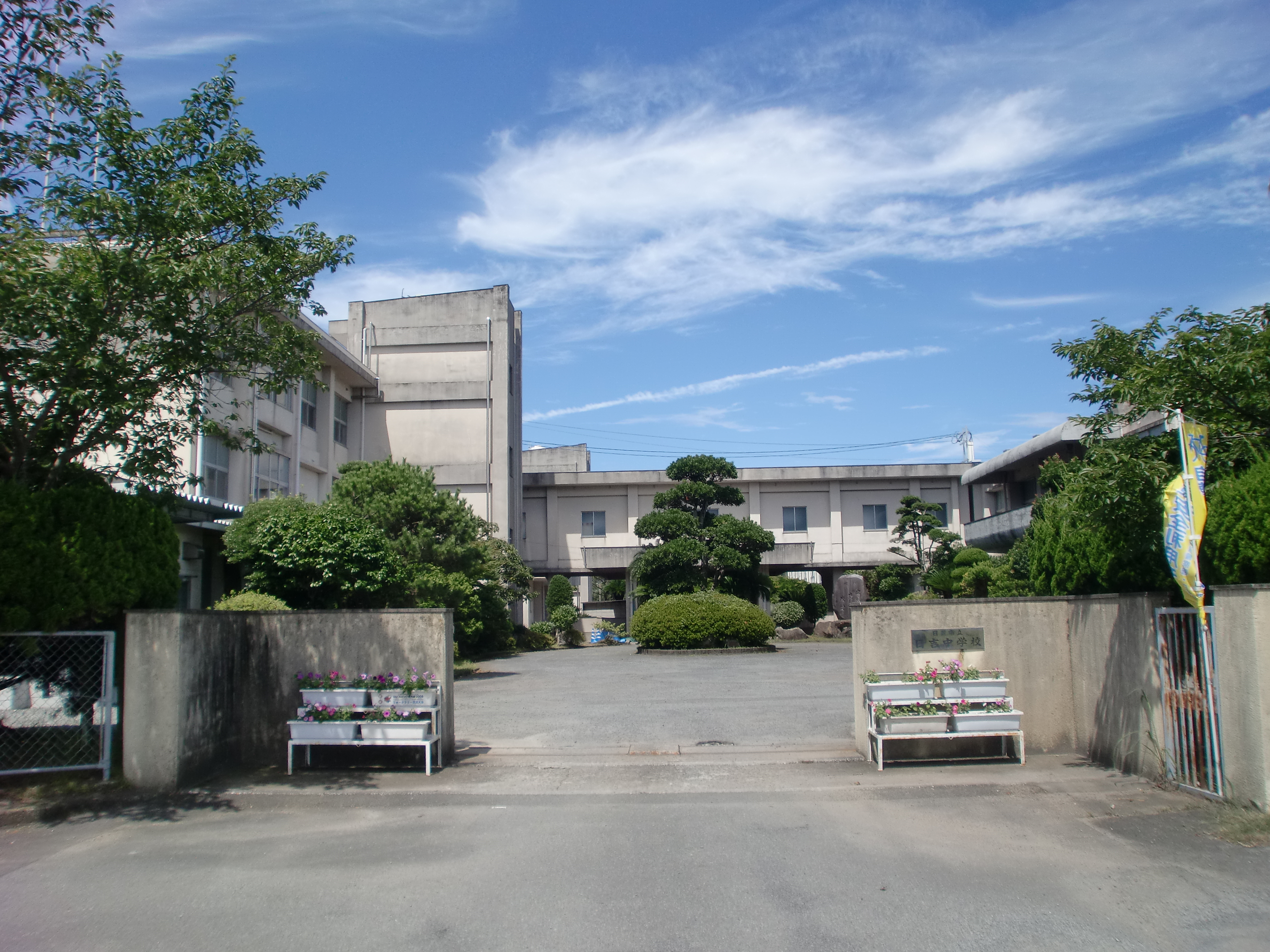 日置市立日吉中学校の外観（再撮影）。